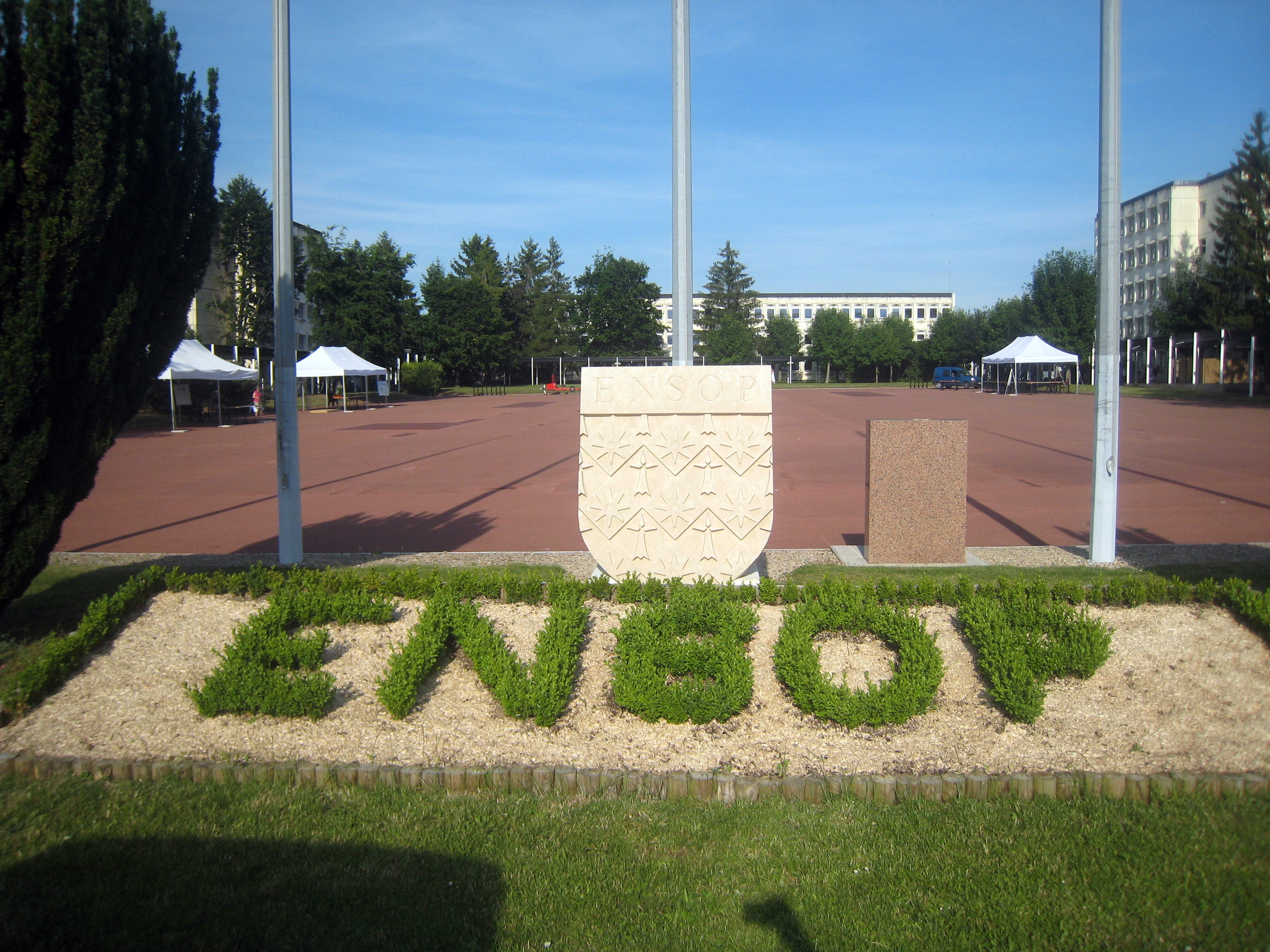 ENSOP à Cannes-Ecluse (Seine et Marne), blason et cour d'honneur